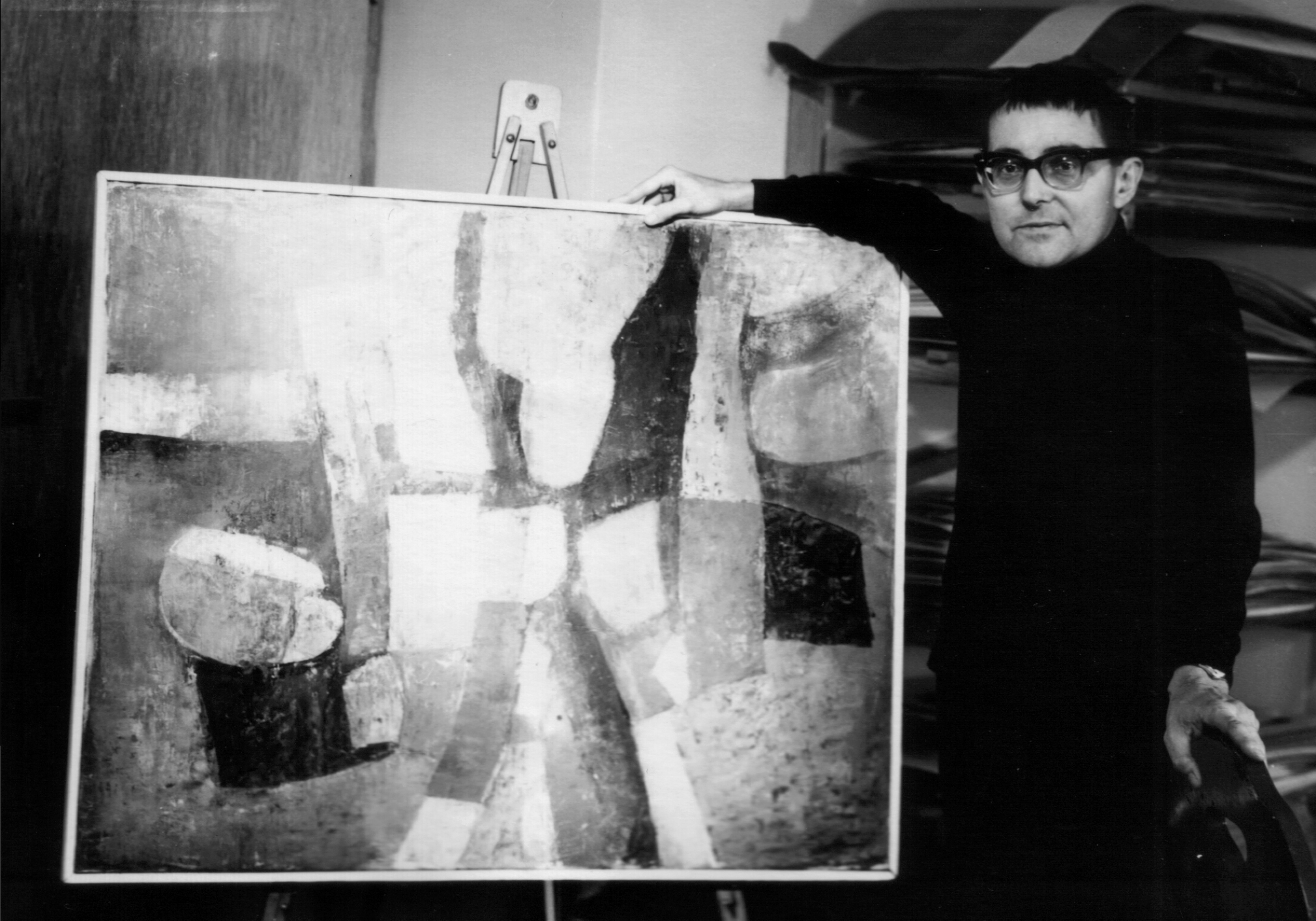 Hans Ebers & Ölbild